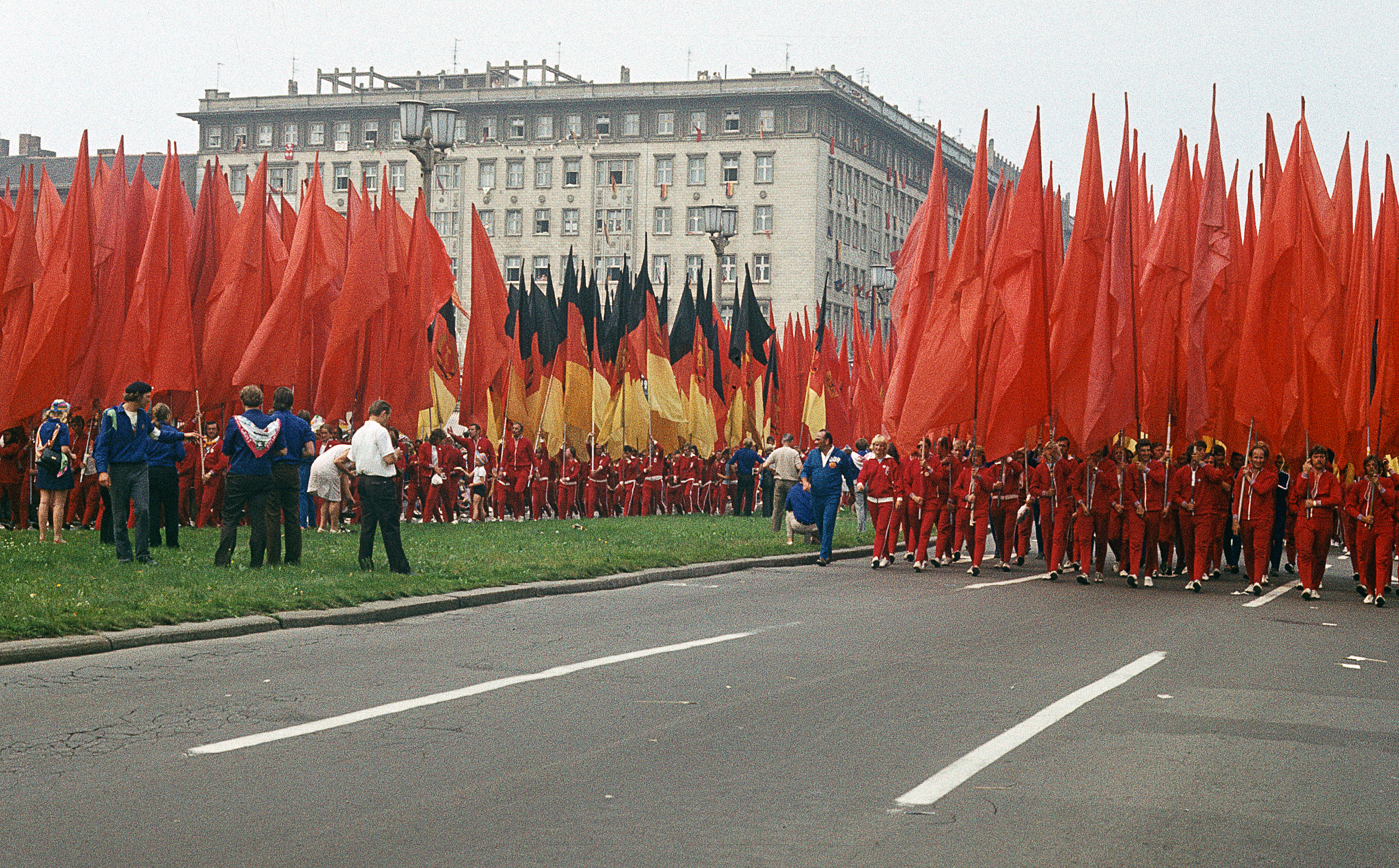 Weltfestspiele der Jugend und Studenten, Berlin 1973